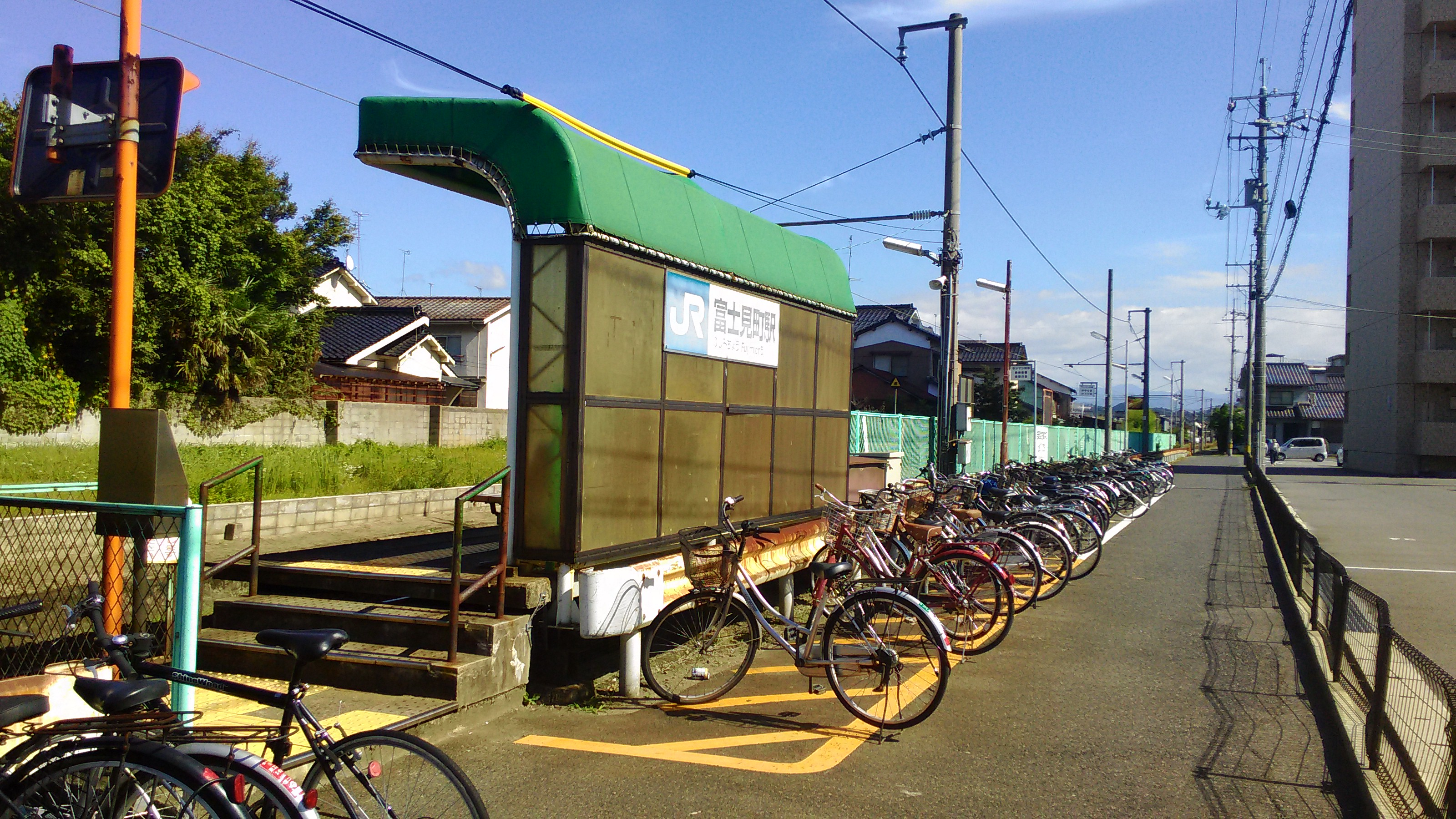 JR西日本境線富士見町駅